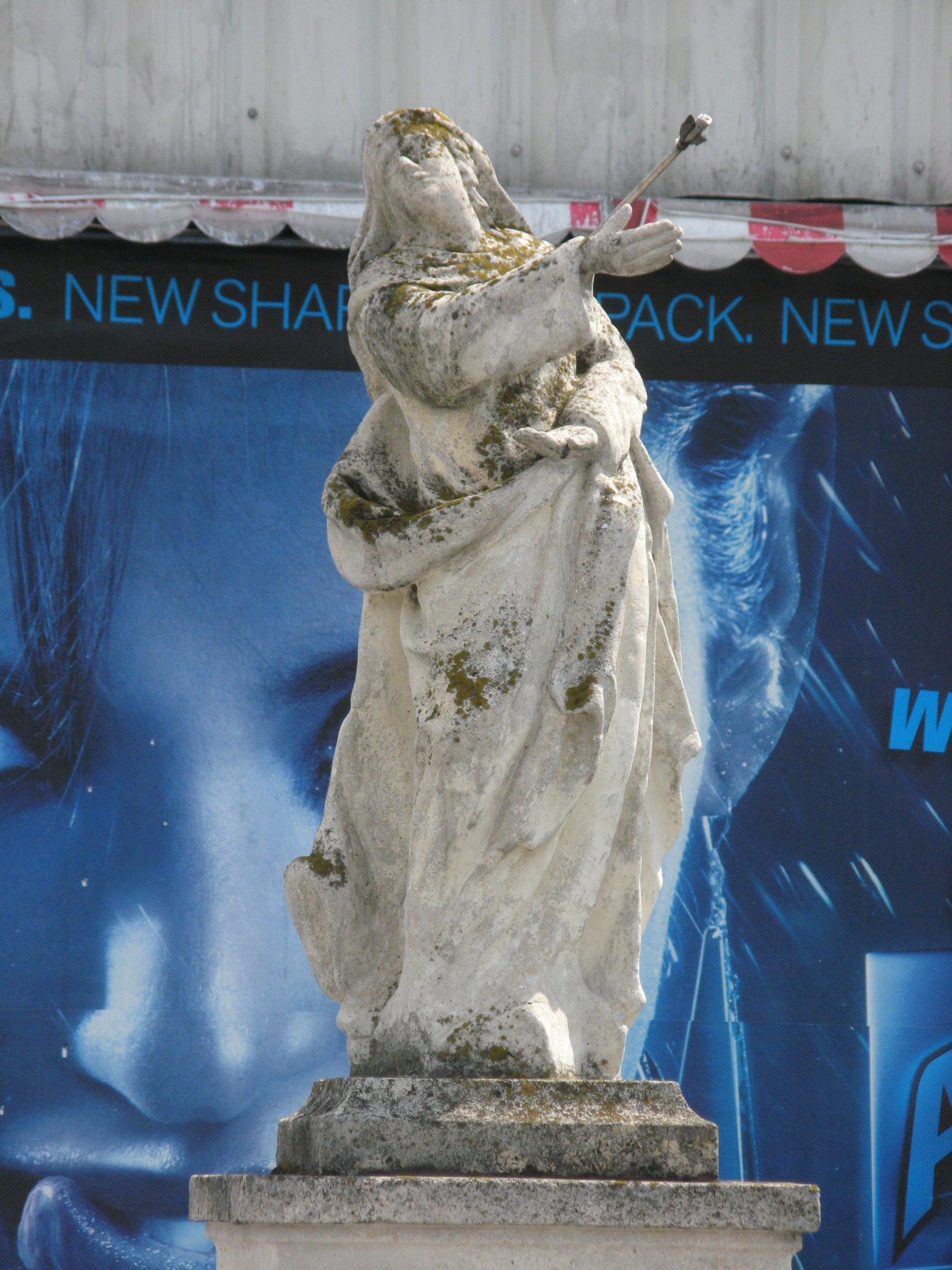 Schmerzhafte Muttergottes am Weißen Kreuz, Oberlaaer Straße/Grundäckerstraße, Wien-Favoriten